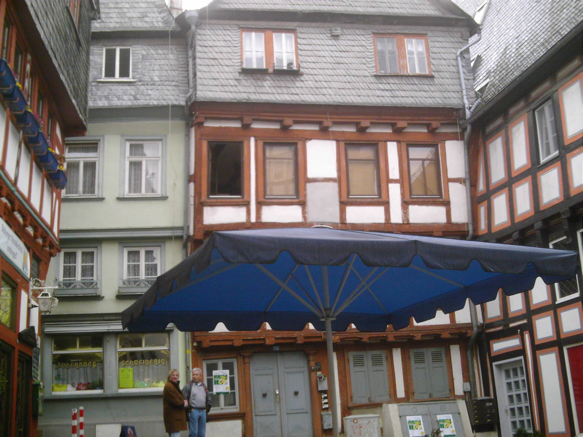 Limburg an der Lahn, Fischmarkt 15